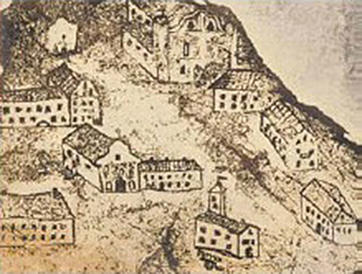 Беларуская (тарашкевіца): Менск (Miensk), Высокае Места (Vysokaje Miesta). Малюнак, знойдзены на гарышчы манастыра базылянак